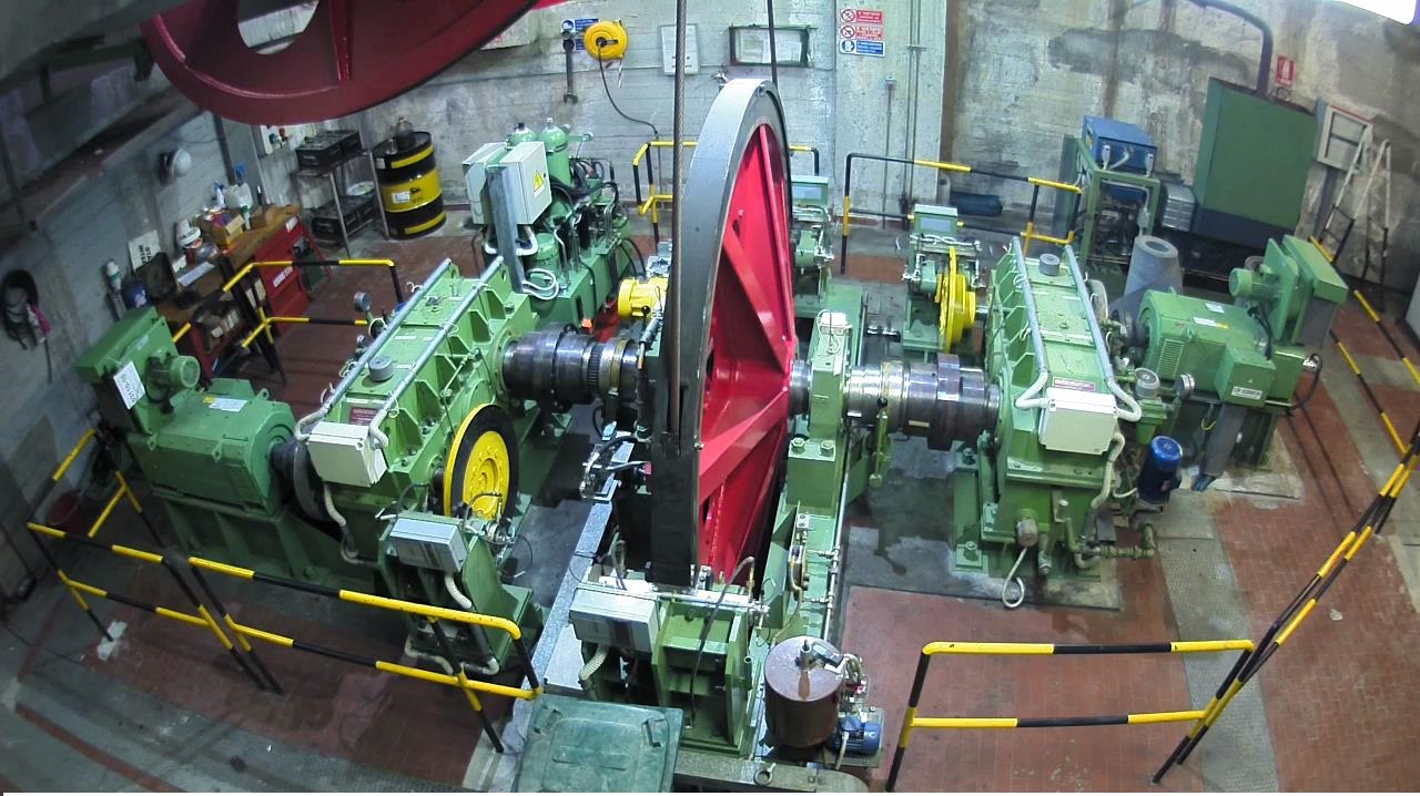 Sala Motori Funicolare di Catanzaro